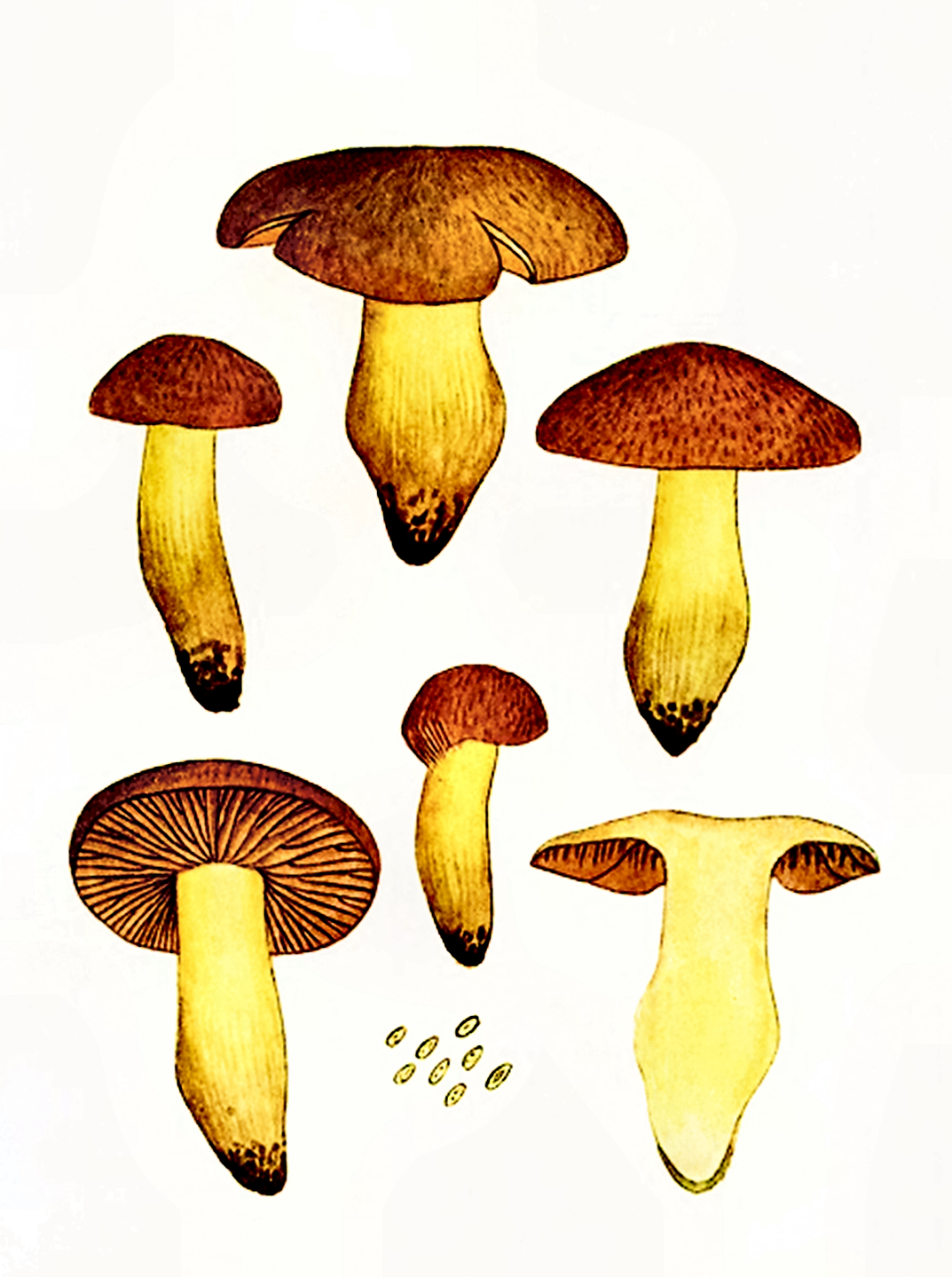 Giacomo Bresadola: Cortinarius orellanus